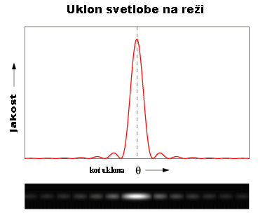 Jakost svetlobe v odvisnosti od uklonskega kota pri difrakciji na reži z eno odprtino.